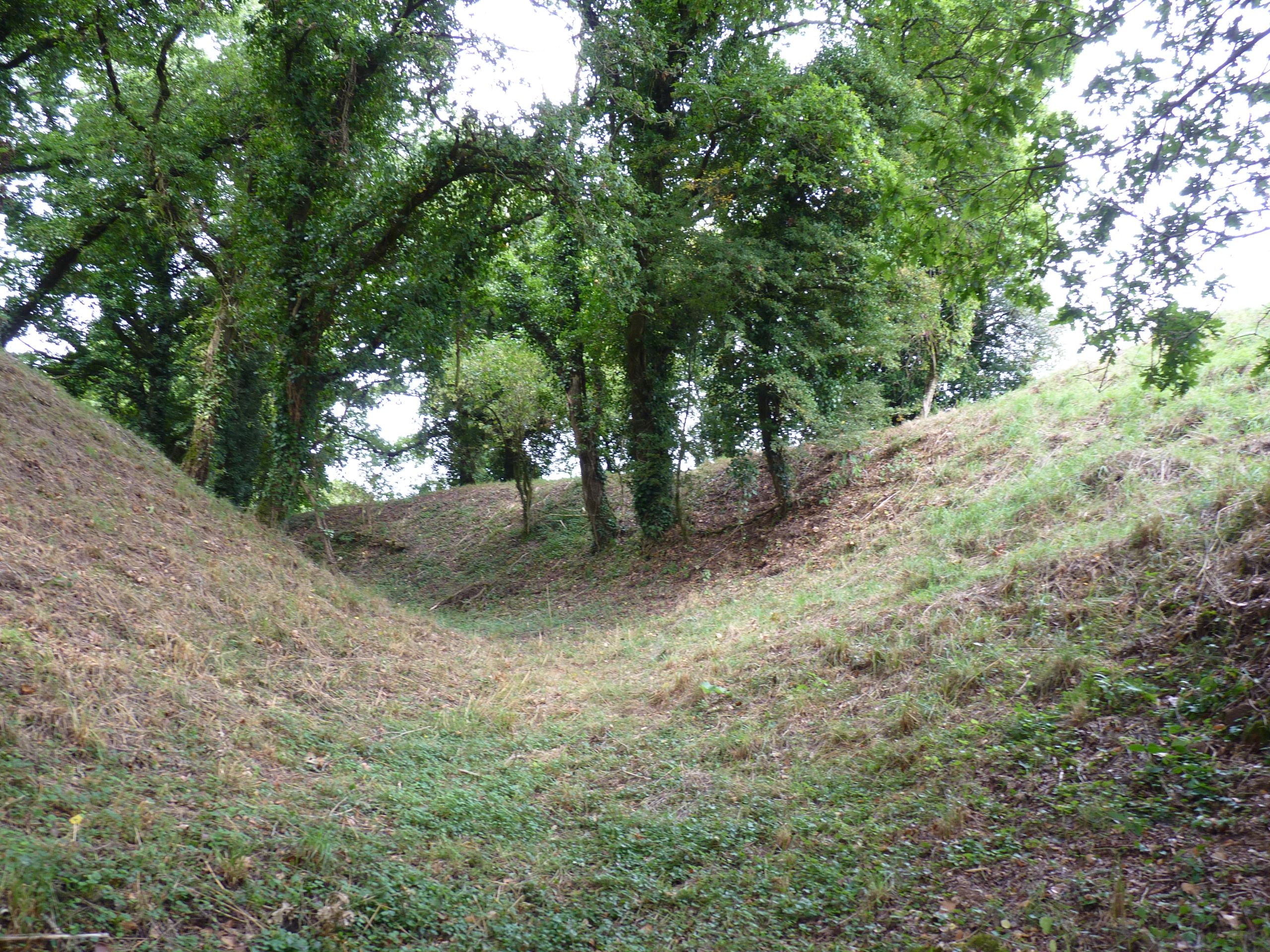 Vues des fossés.